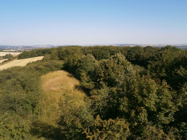 Blick über die Sewekenberge